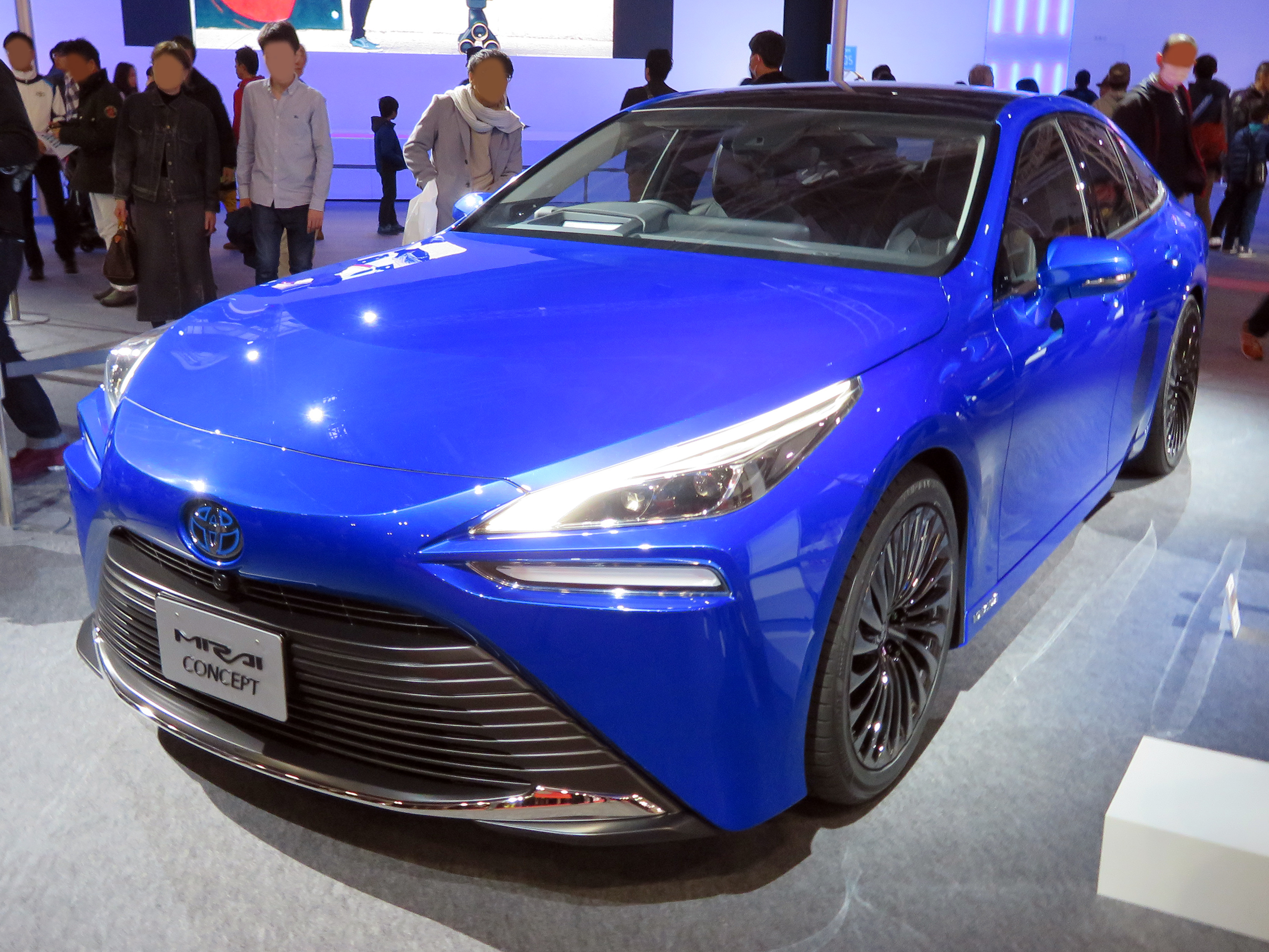 大阪モーターショー2019に於いてトヨタ・MIRAIコンセプトを撮影。